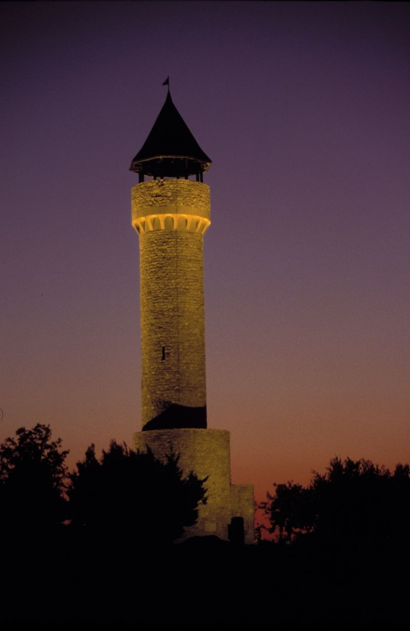 Wartbergturm in Alzey Foto: E. Tinnacher (Benutzer:Serie1, eigenes Foto)